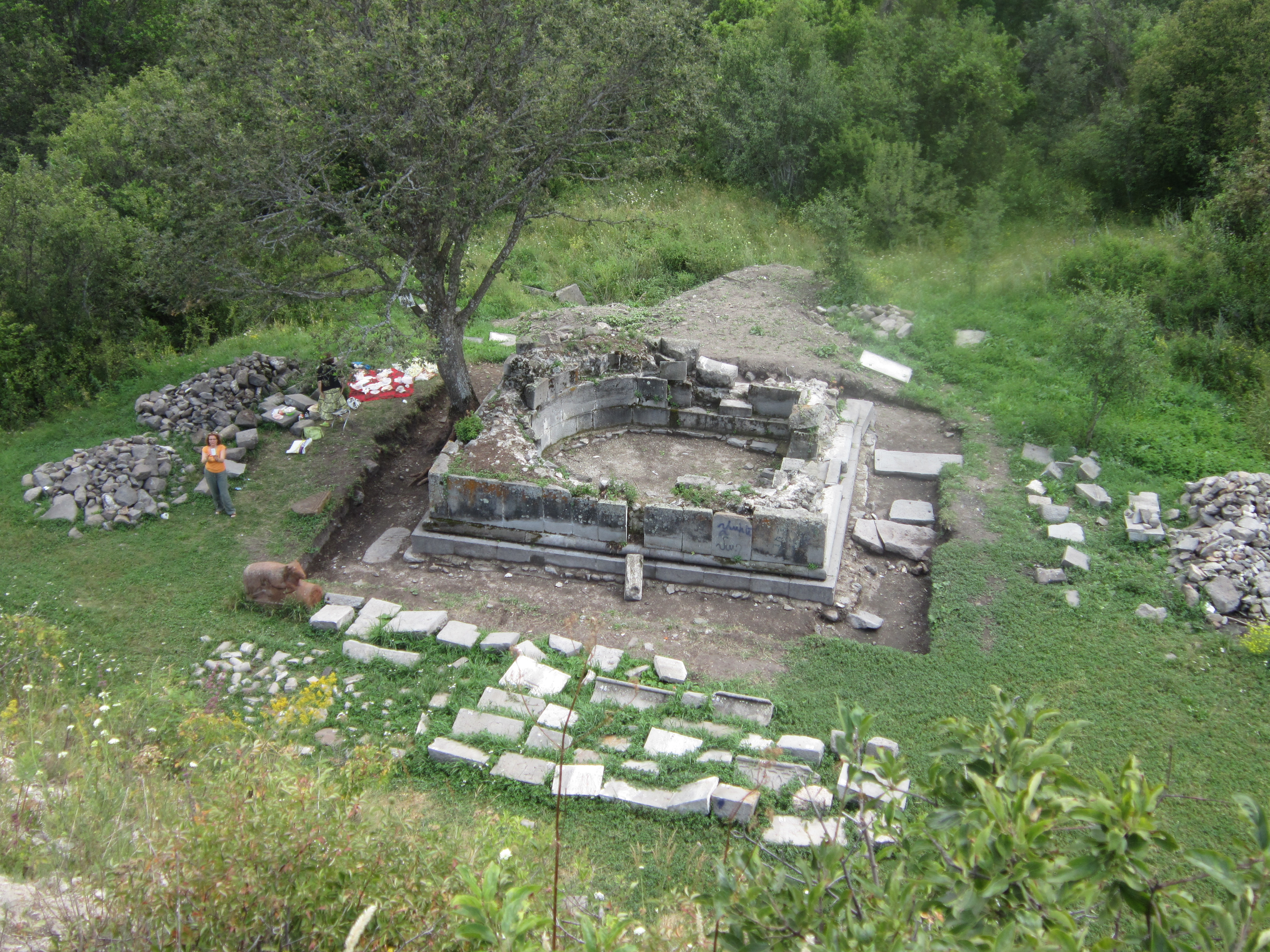 Վանական համալիր Թեժառույքի վանք (Գյուրջիքիլիսա, Թուխ Մանուկ) 45/11